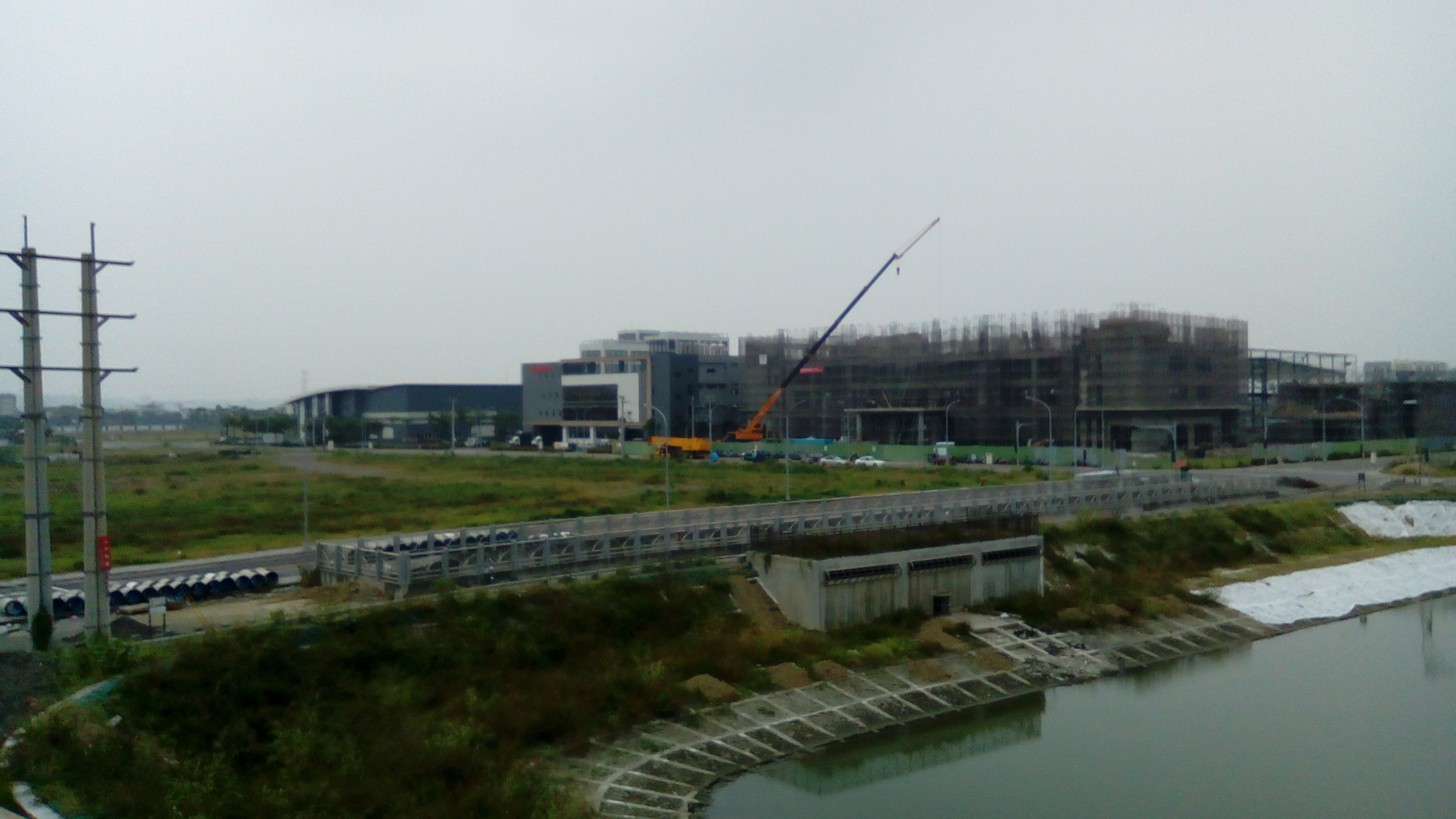 位於萬大橋西端